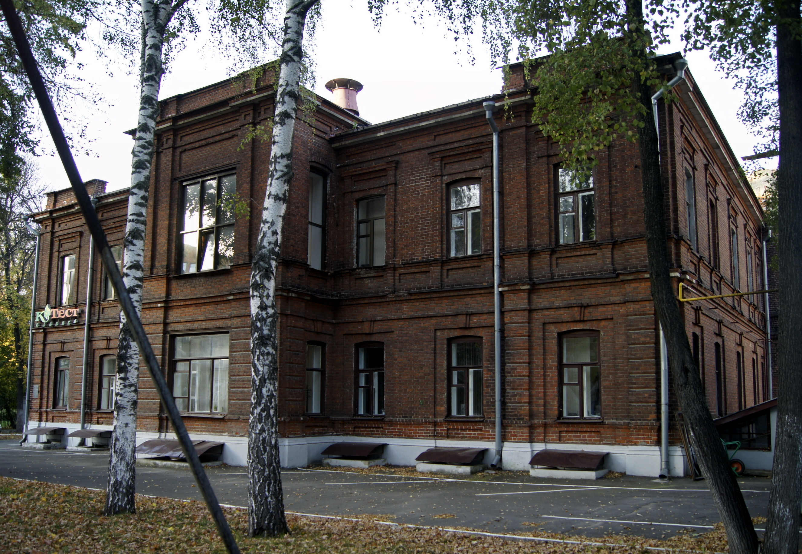 Хирургический комплекс: улица Минина, 20/3, литер Б, Нижний Новгород, Нижегородская область